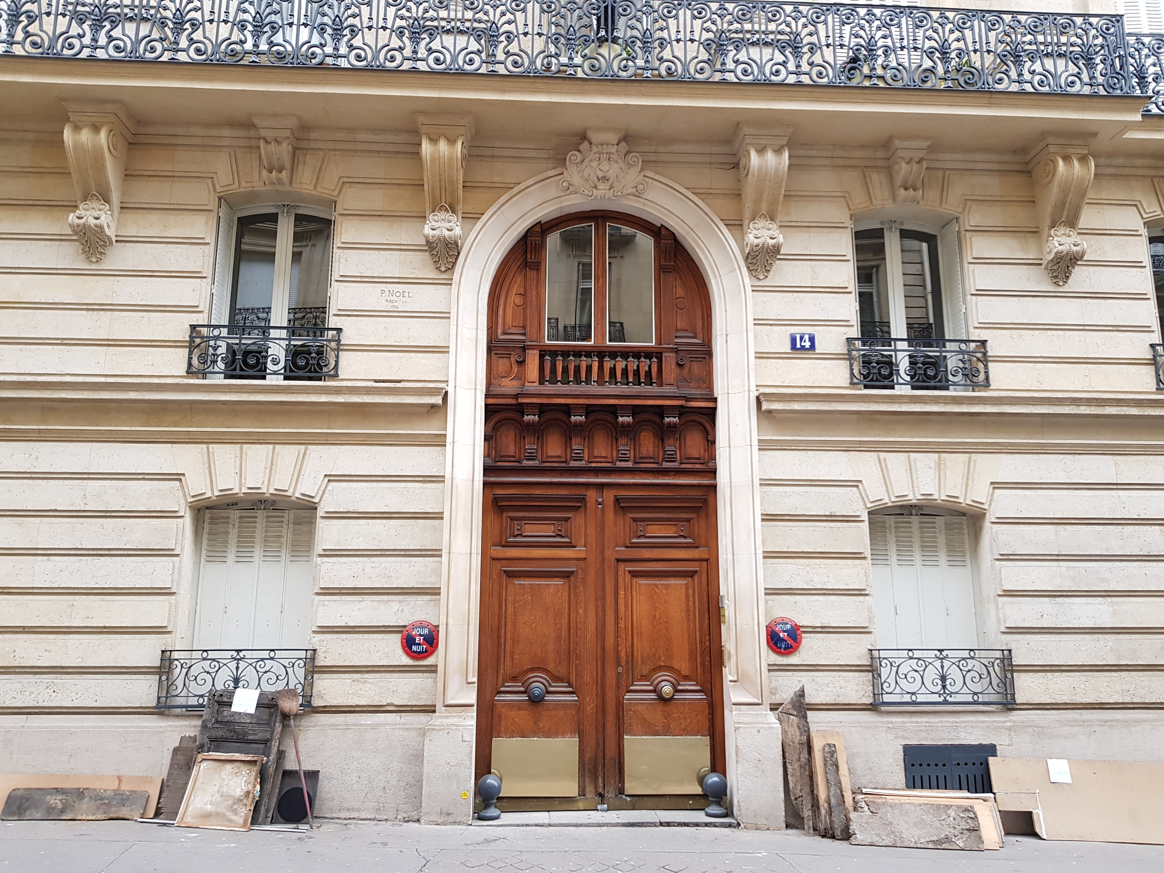 Entrée du 14, rue de Magdebourg, Paris 16e.